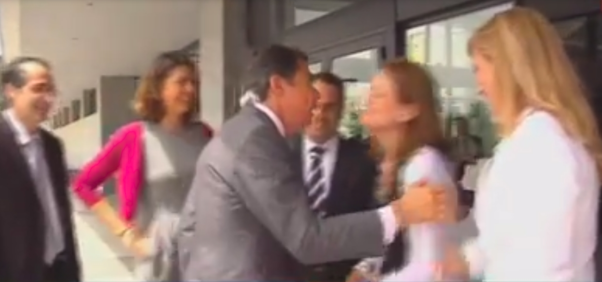 El Presidente de la Comunidad de Madrid, Ignacio González, acompañado por la Consejera de Educación, Juventud y Deporte, Lucía Figar, mantiene su segunda reunión con los rectores de las seis universidades públicas madrileñas desde que preside el Ejecutivo autonómico.